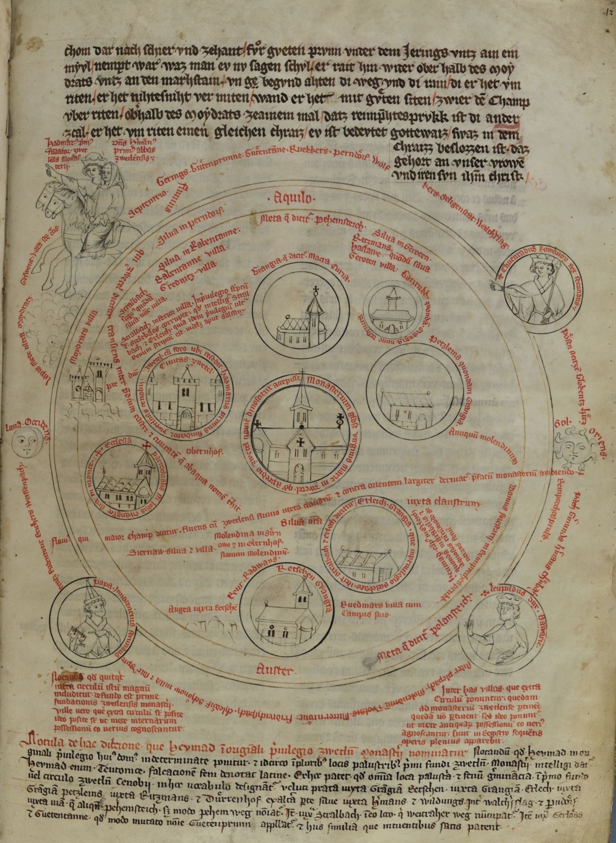 Miniatur mit der Zwettler Gründungssage auf f. 12r der Bärenhaut - Die Zeichnung auf fol. 12r illustriert die Gründungssage des Klosters Zwettl: links oben reiten Hadmar I. von Kuenring und Hermann, der erste Abt von Zwettl, um das Gebiet, das hinfort dem Kloster gehören soll. Dieser Rundritt wird durch einen großen Kreis dargestellt; innerhalb des Kreises befinden sich acht Medaillons mit Besitztümern von Zwettl: Rund um die Klosterkirche Zwettl sind die Grangien Dürnhof, Gaisruck, Pötzles, Edelhof und Ratschenhof angeordnet, sowie die Stadt Zwettl und die Pfarrkirche St. Johannes in Zwettl. An der Außenseite des Kreises befinden sich drei Medaillons mit Papst Innozenz II., König Konrad III. und Herzog Leopold von Bayern. Auf der gegenüberliegenden Seite (fol. 11v) weist eine Hand in einem Halbkreis auf Hadmar und Hermann.